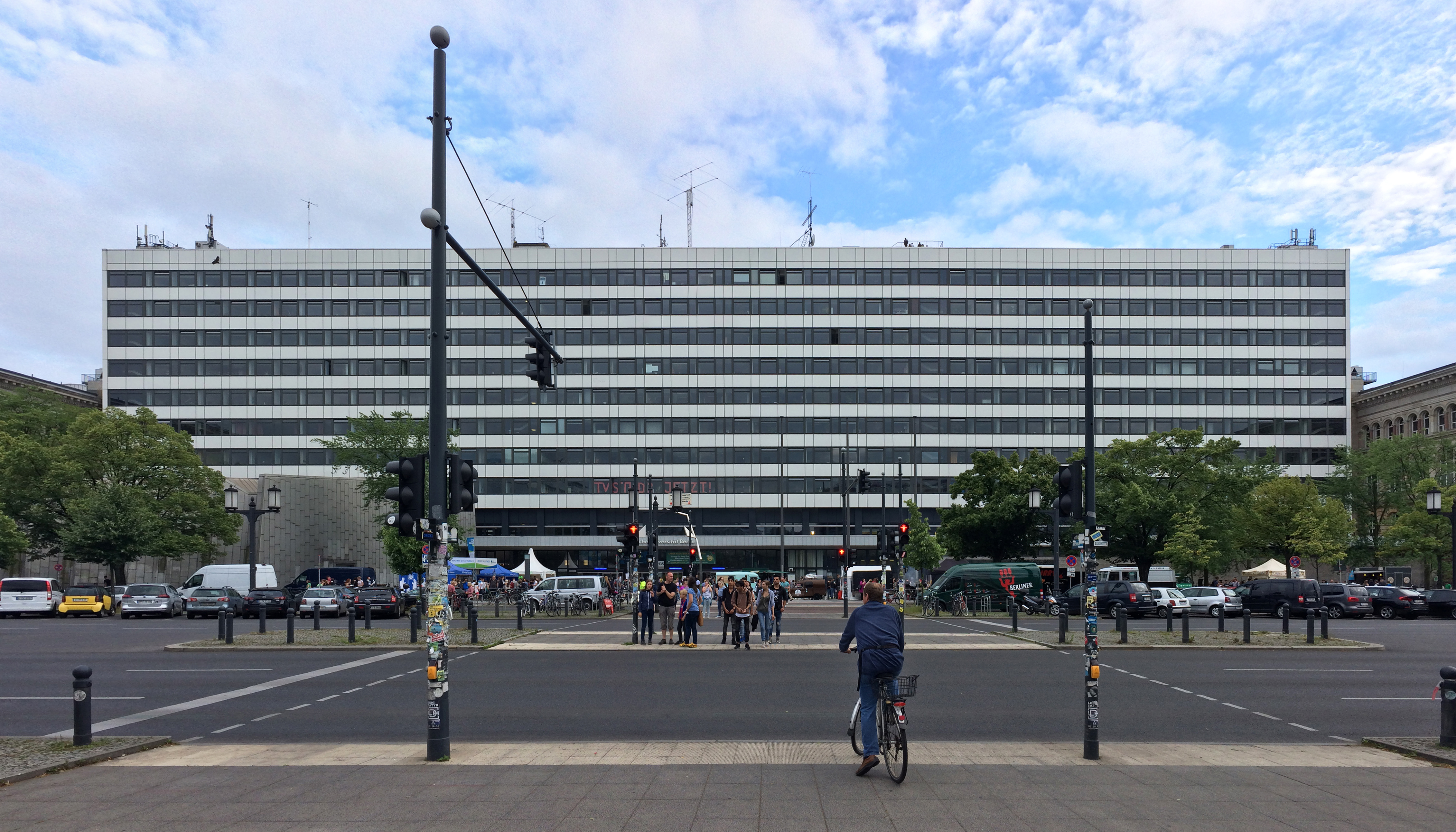 Technische Universität Berlin, Hauptgebäude, Entwurf 1958–1961, Ausführung 1963–1968, Kurt Dübbers & Karl-Heinz Schwennicke (auch bekannt als ›Carl-Heinz Schwennicke‹, ›Carl-Heinrich Schwennicke‹ oder ›Karl-Heinrich Schwennicke‹), Straße des 17. Juni, Berlin-Charlottenburg